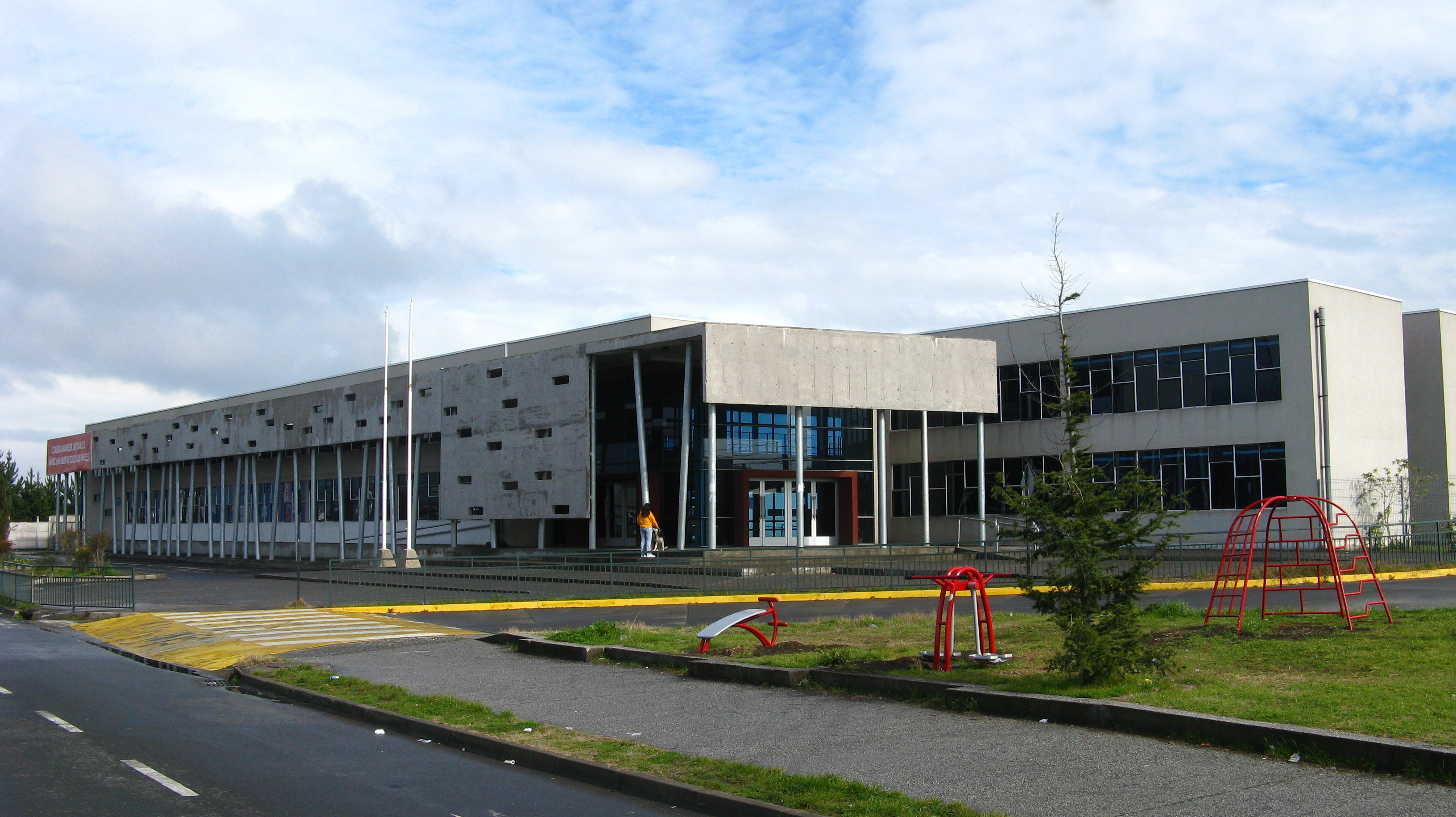 Colegio en Portal San Pedro San Pedro de la Paz, Provincia de Concepción, Chile Julio de 2012